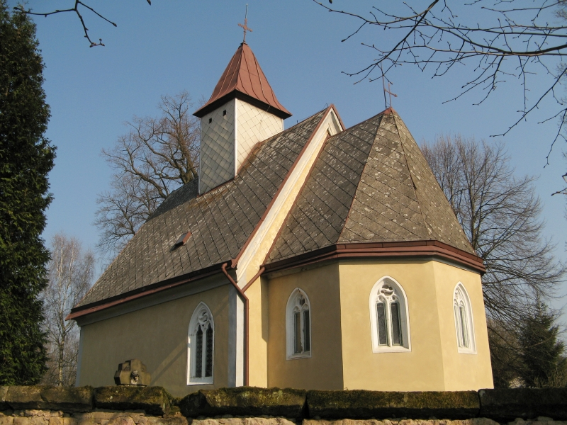 Kostel sv. Petra a Pavla, Stav